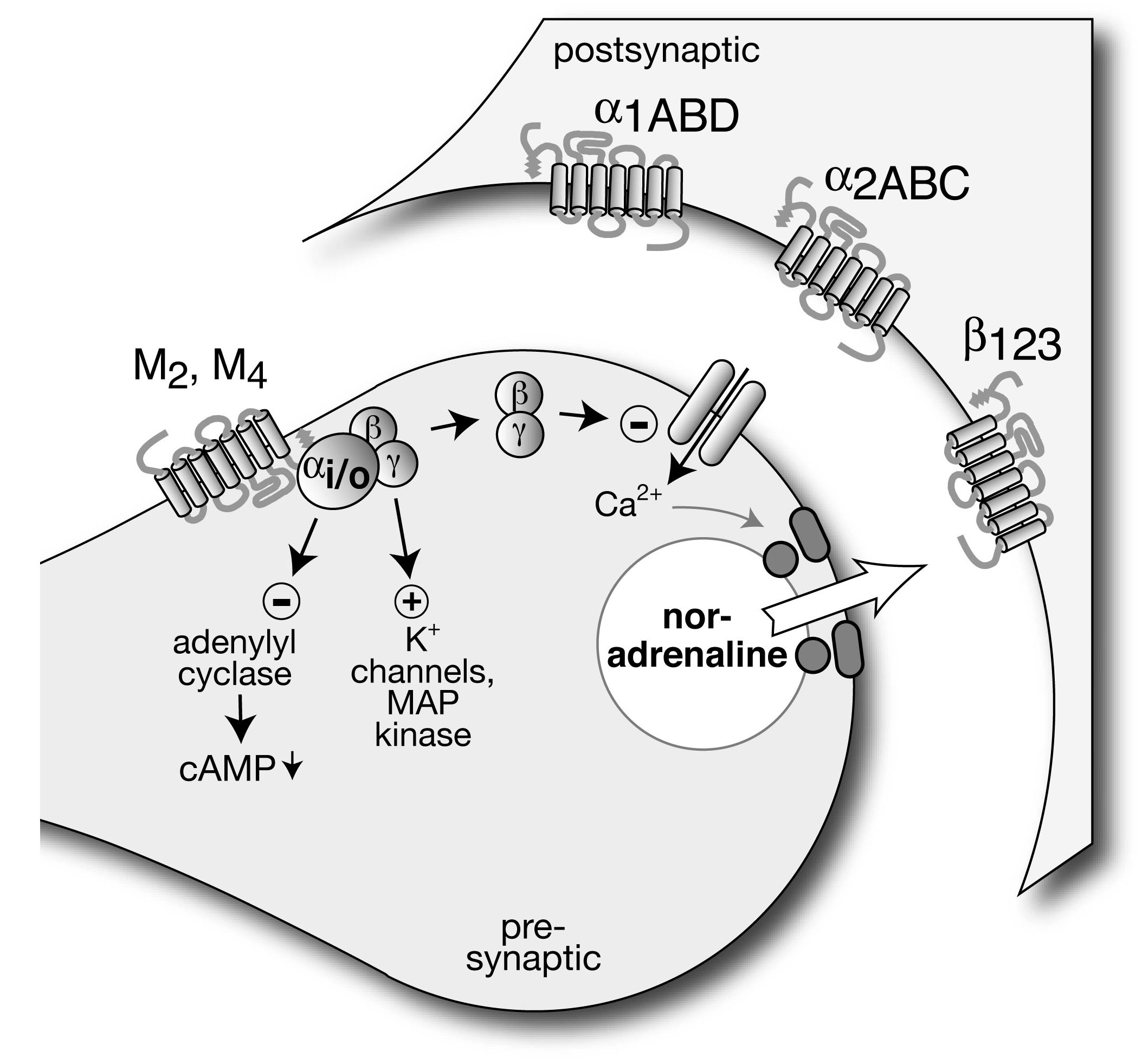 Schema eines präsynaptischen Rezeptors